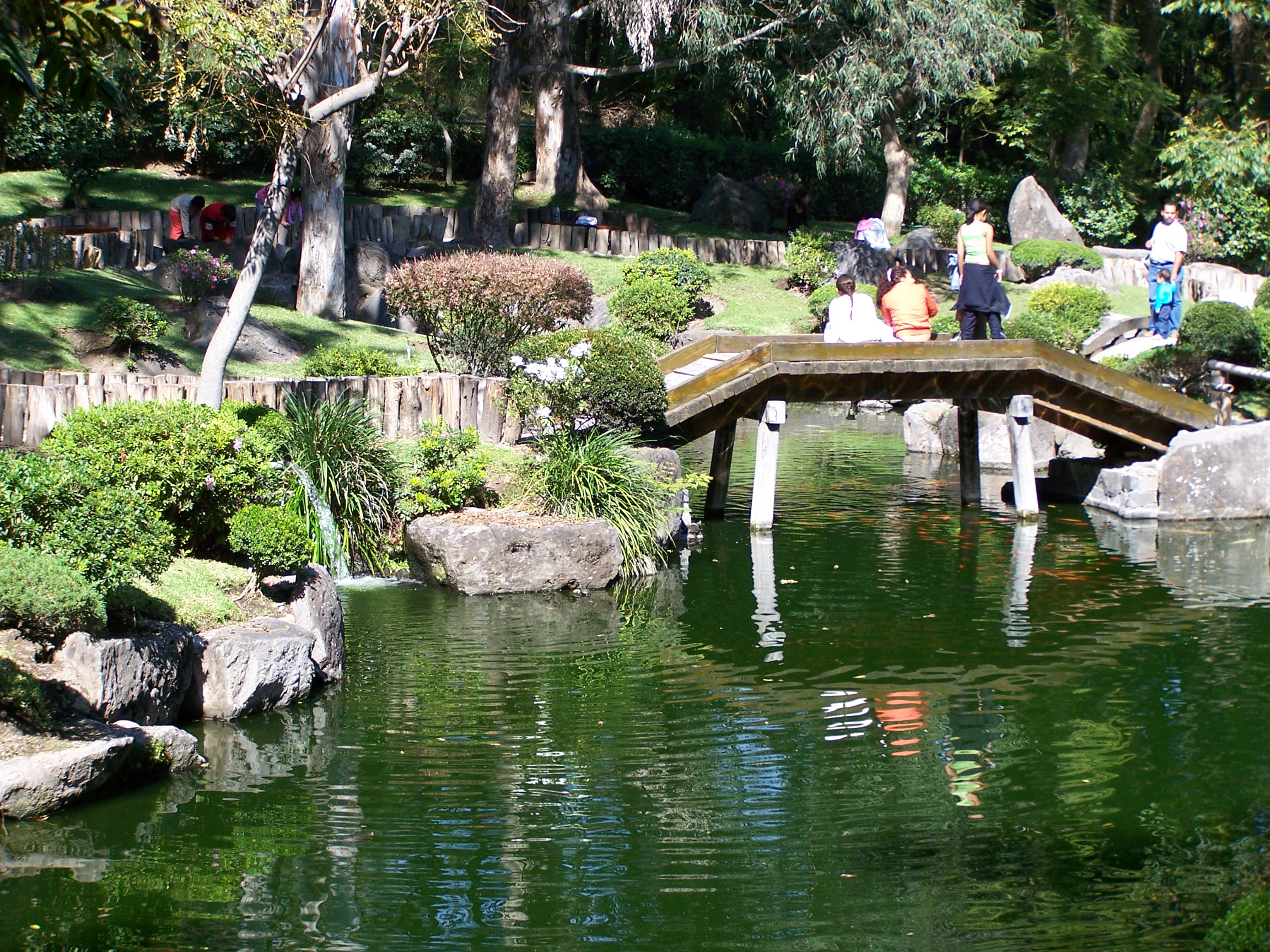 Parque Colomos, "jardín japonés", at Guadalajara, México. Own work. Shot 17 december 2006.